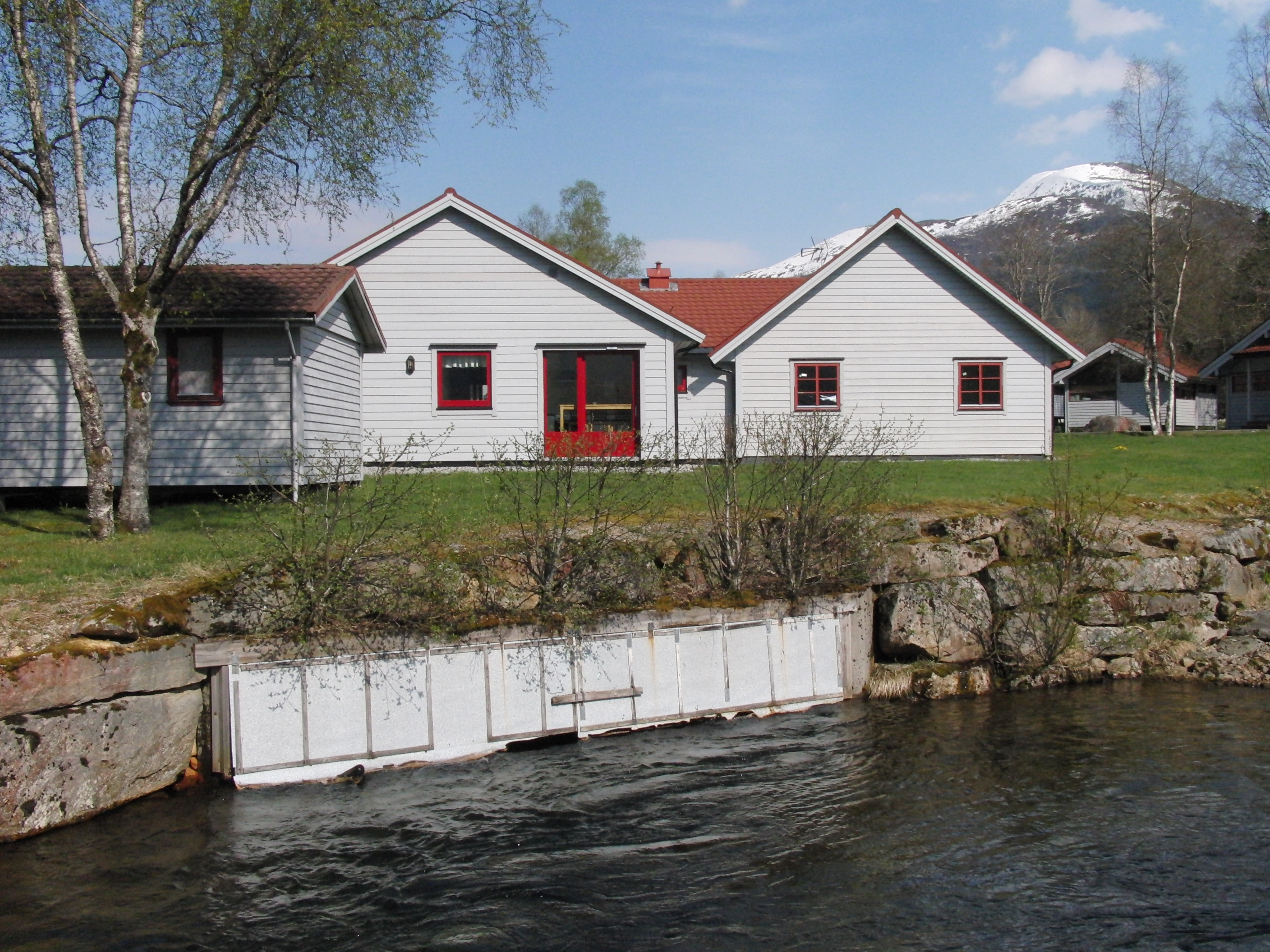 Jølstraholmen kraftverk